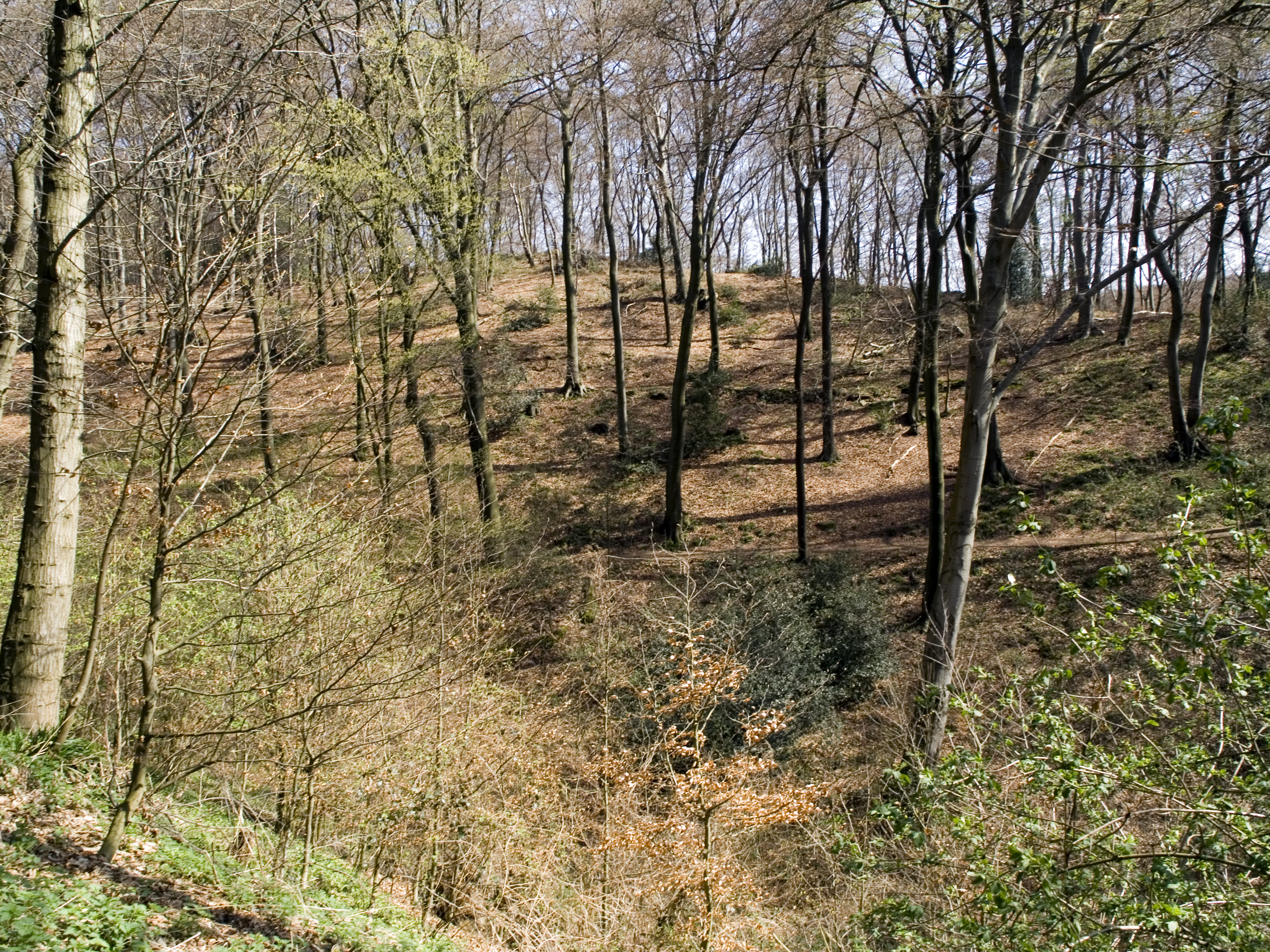 Wald im Landschaftsschutzgebiet „Hohenstein“ in Witten